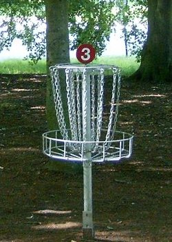 Discgolfkorg. Bilden tagen i Slottsskogen, Göteborg av Dennis Björklund 26 juni 2005 kl.10.54 (CEST).